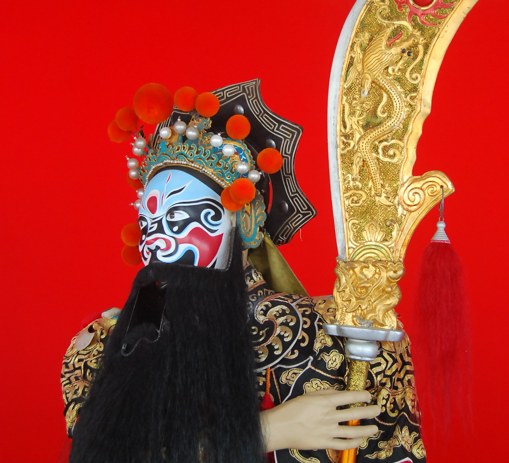 京剧中的周仓扮相，于梅兰芳大剧院